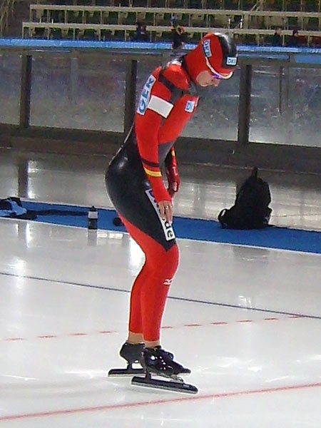 Daniela Anschütz-Thoms bei den deutsche Eisschnellauf-Einzelstrecken-Meisterschaften 2009 in Berlin, 1000 m